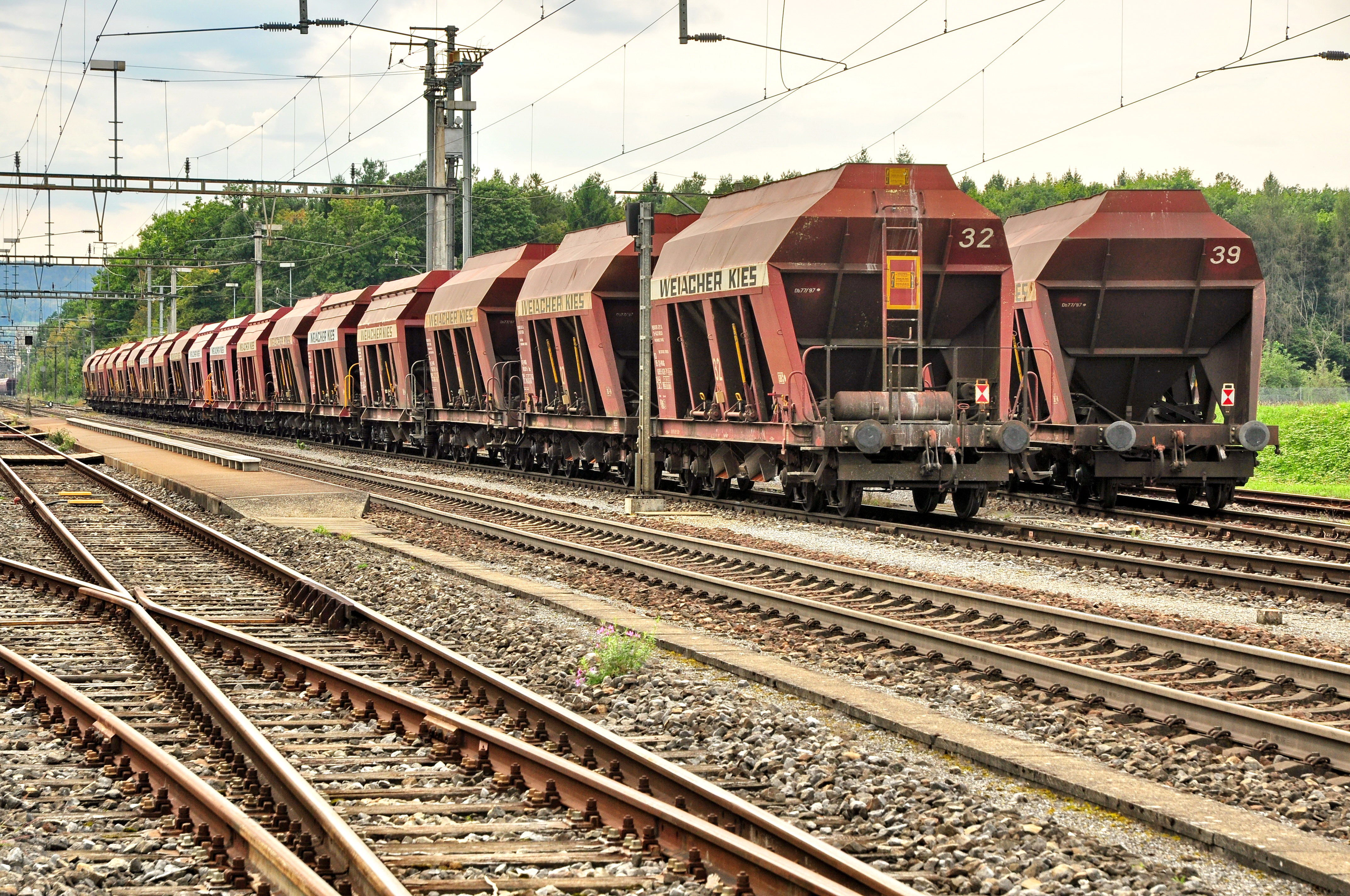 Weiacher Kies, Zweidlen in Glattfelden (Switzerland)